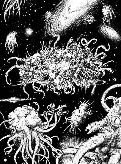 Vision d'artiste d'Azathoth en noir et blanc.